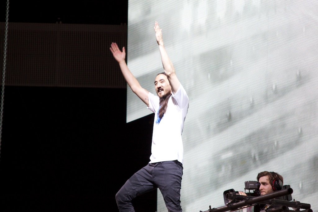 Steve Aoki auf dem WorldClubDome 2015